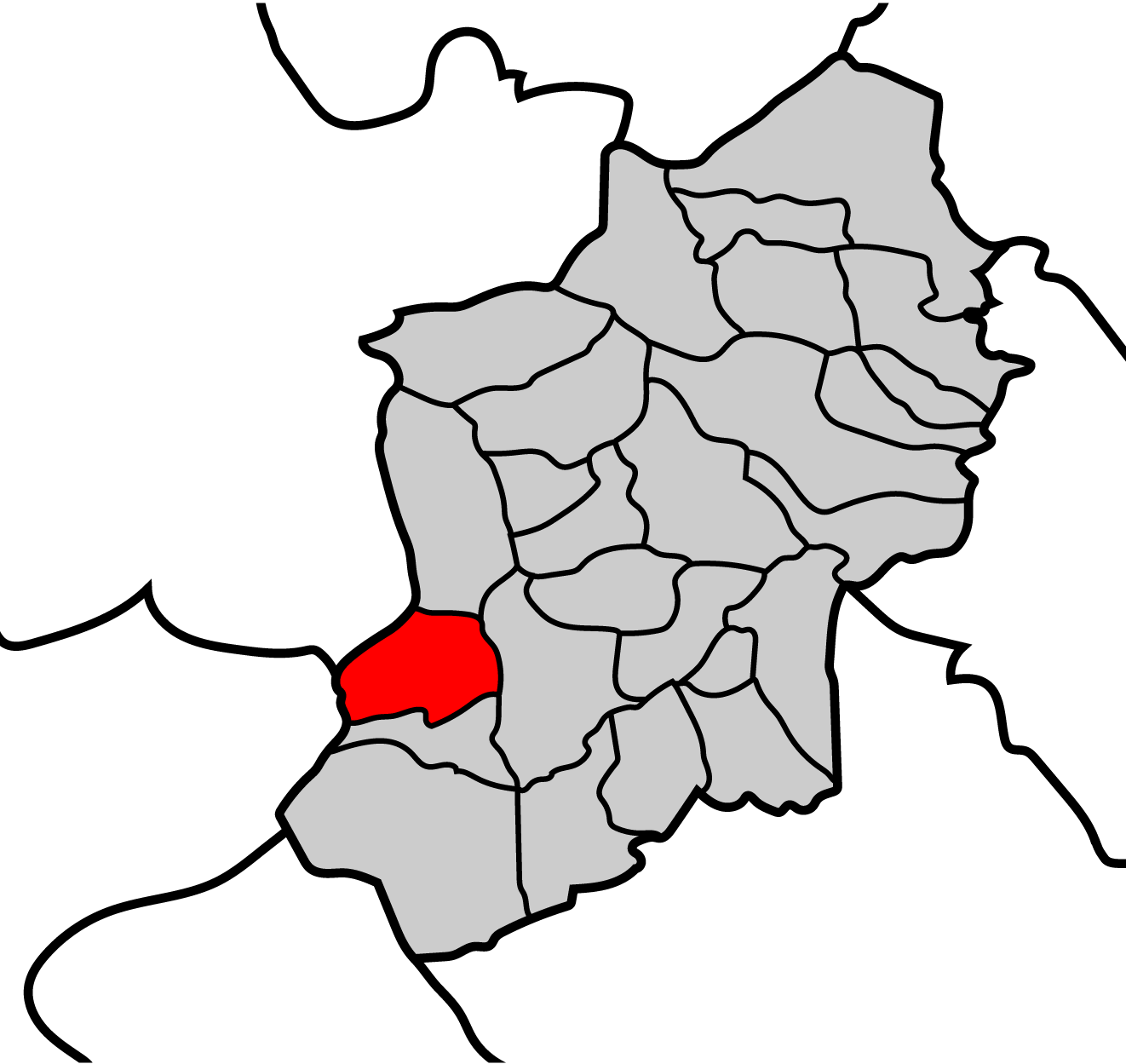 Mapa de la parroquia de Vilouta ayuntamiento de Becerreá